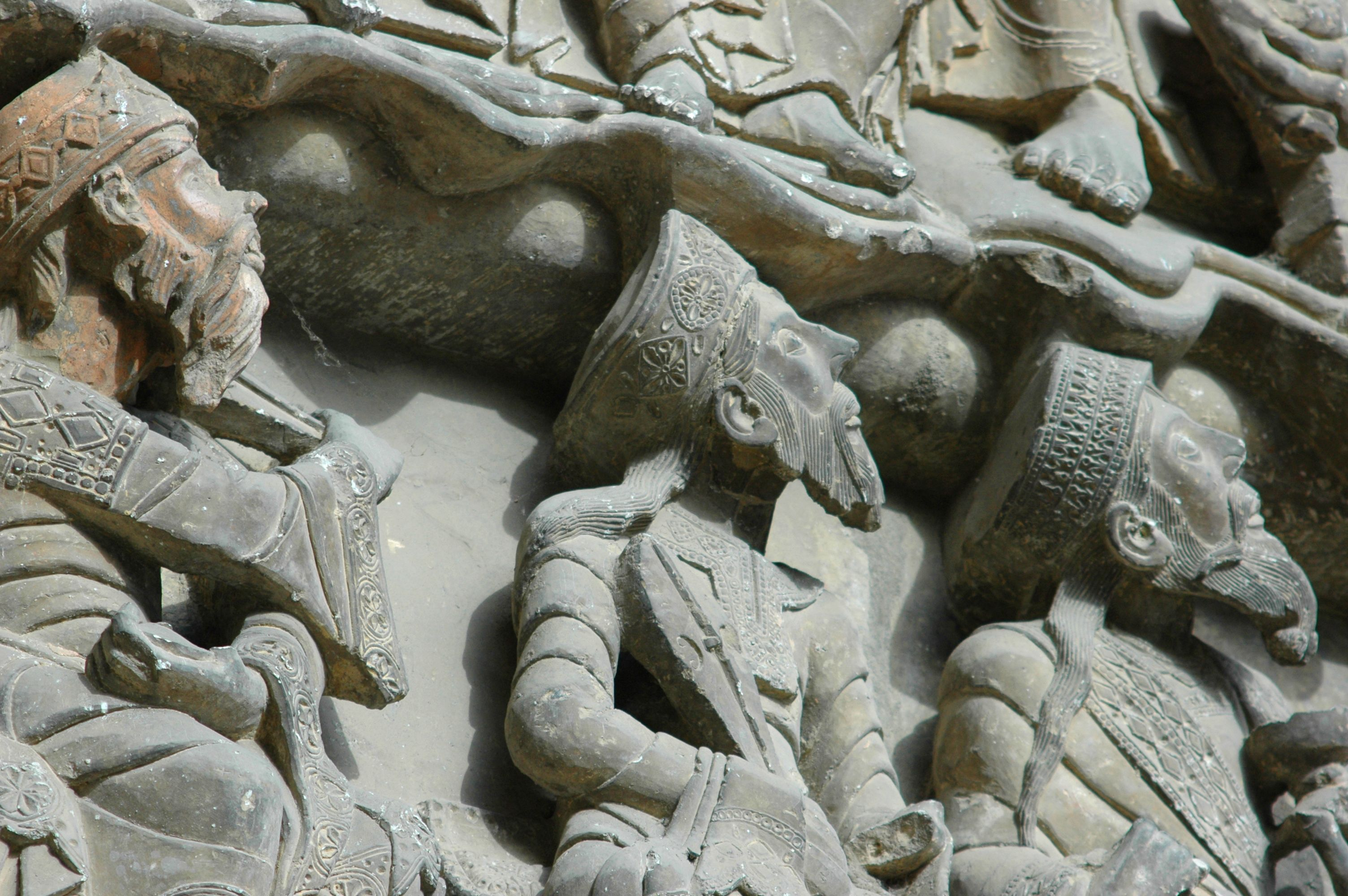 Abadia de Saint-Pierre de Moissac - Detall portalada